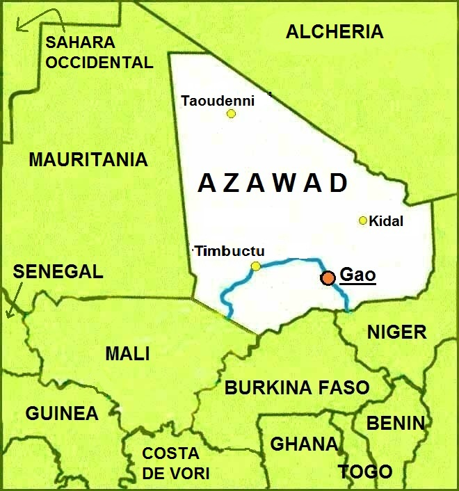 Aragonés: Mapa d'o Azawad